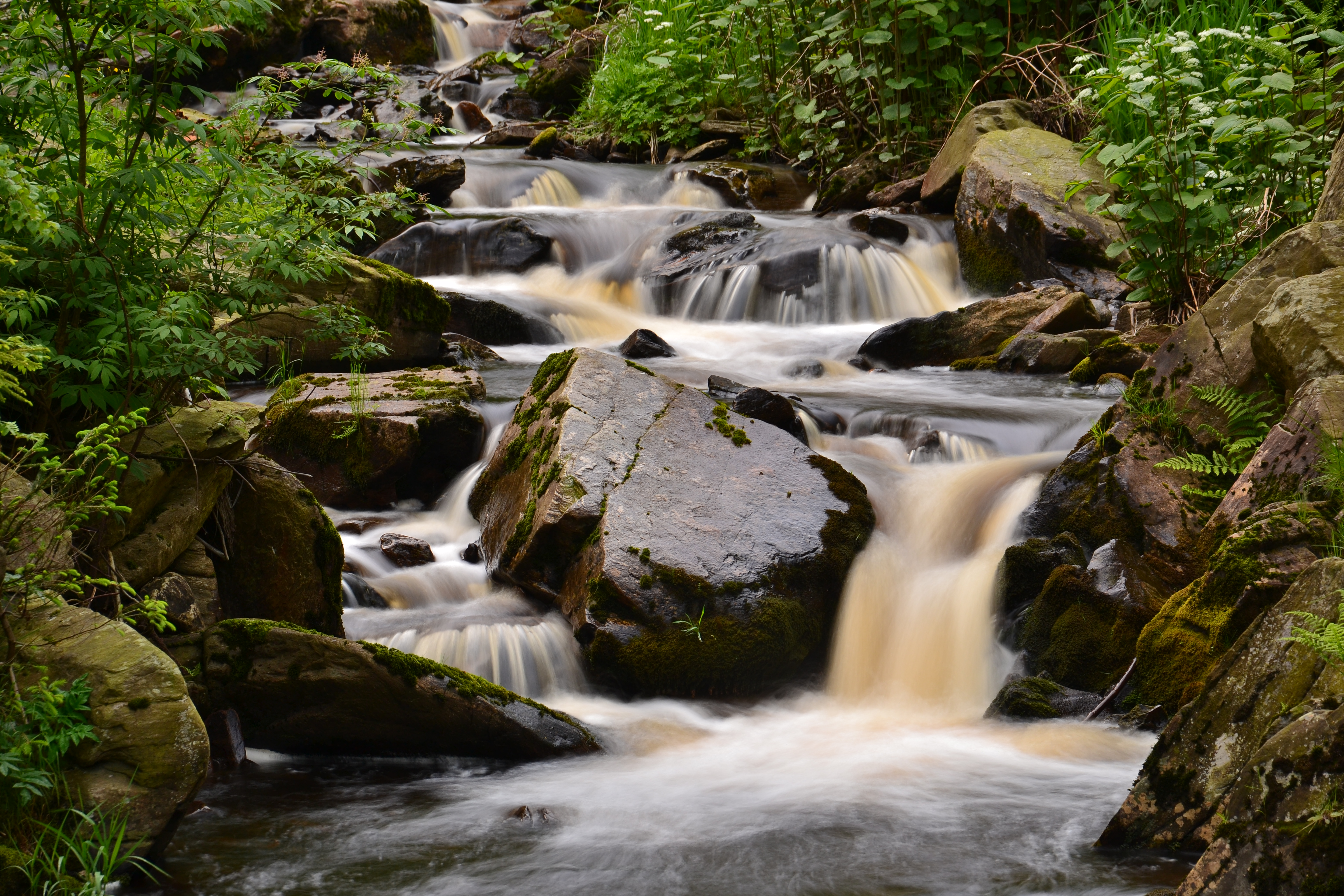 Prunéřovský potok mezi Úbočím a Celnou